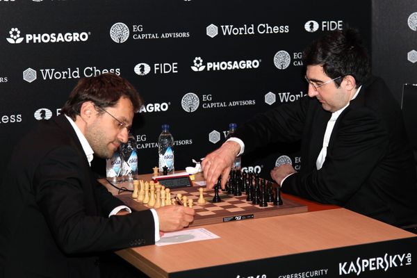 Аронян — Крамник, Турнир Претендентов 2018